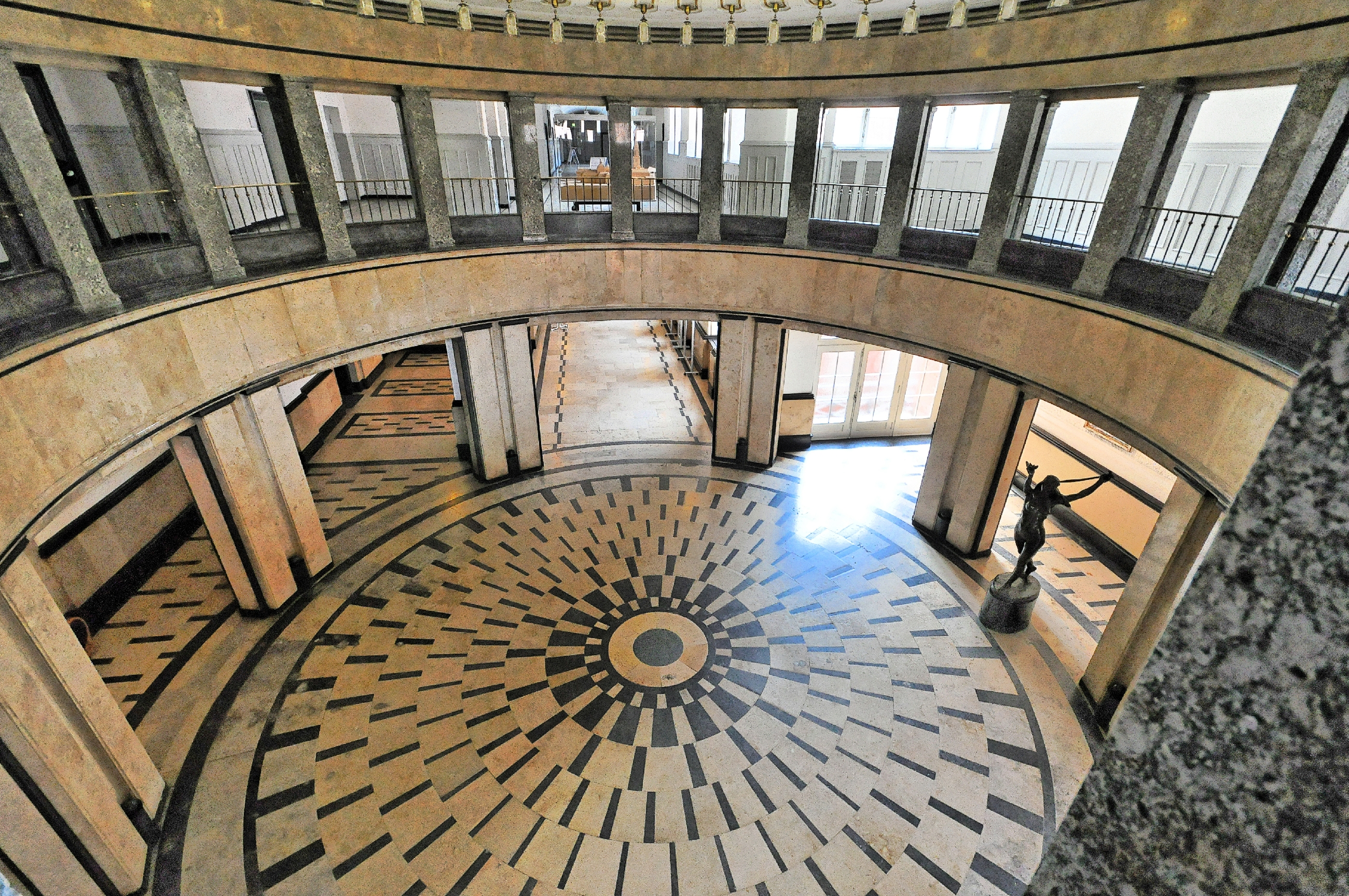 Kiel, Bilder wärend des Landtagsprojekt Schleswig-Holstein 2013